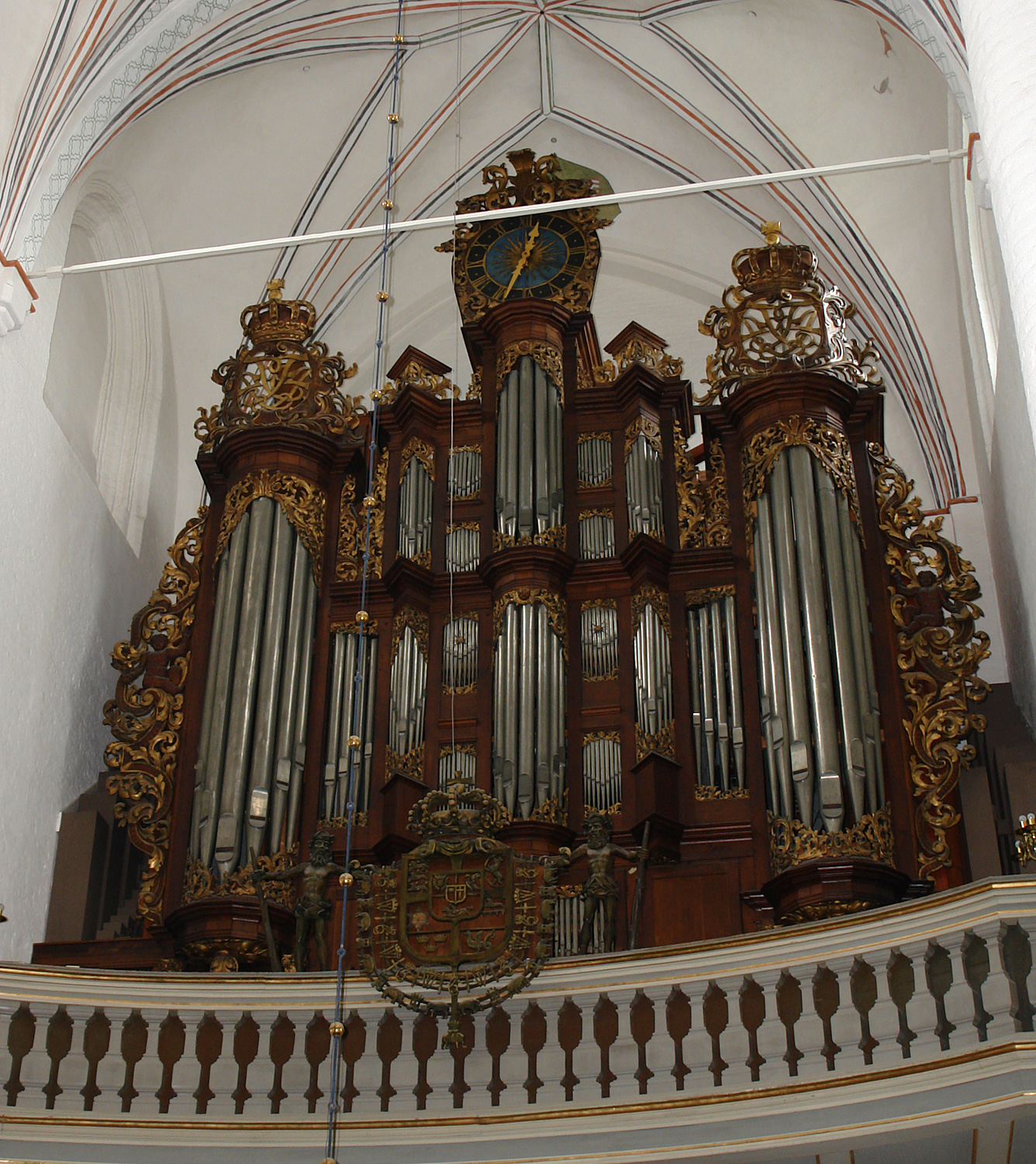 Dom zu Århus: Orgelfassade im Barockstil von Lambrecht Daniel Carsten (Carstens, Kastens), in den 1980er Jahren nach Entwürfen von Albrecht Schweitzer restauriert